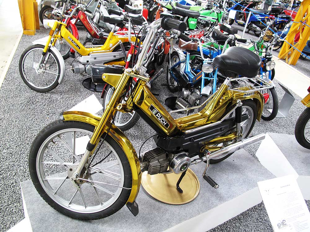 Dieses vergoldete Puch Maxi S2 ist das Jubiläumsfahrzeug, mit dem sich die dritte Millionen erzeugter Puch-Mopeds gerundet hat. (Johann Puch-Museum Graz)